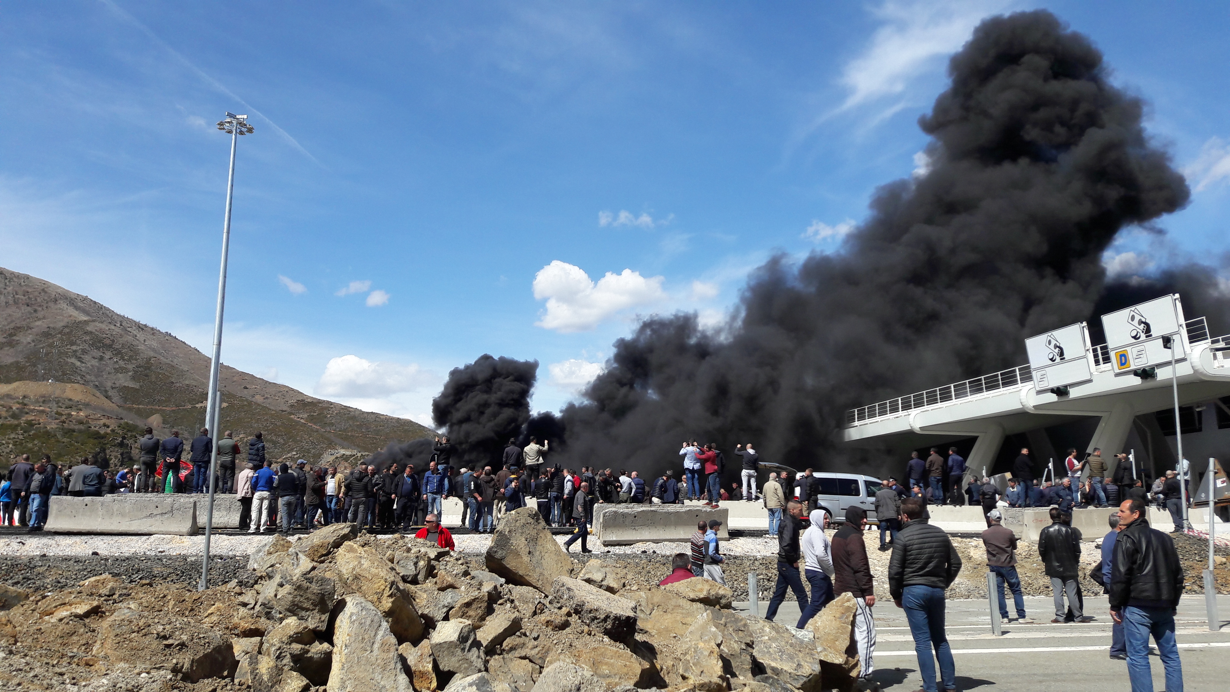 Djegia e heqja e trarit në Kalimash, Kukës